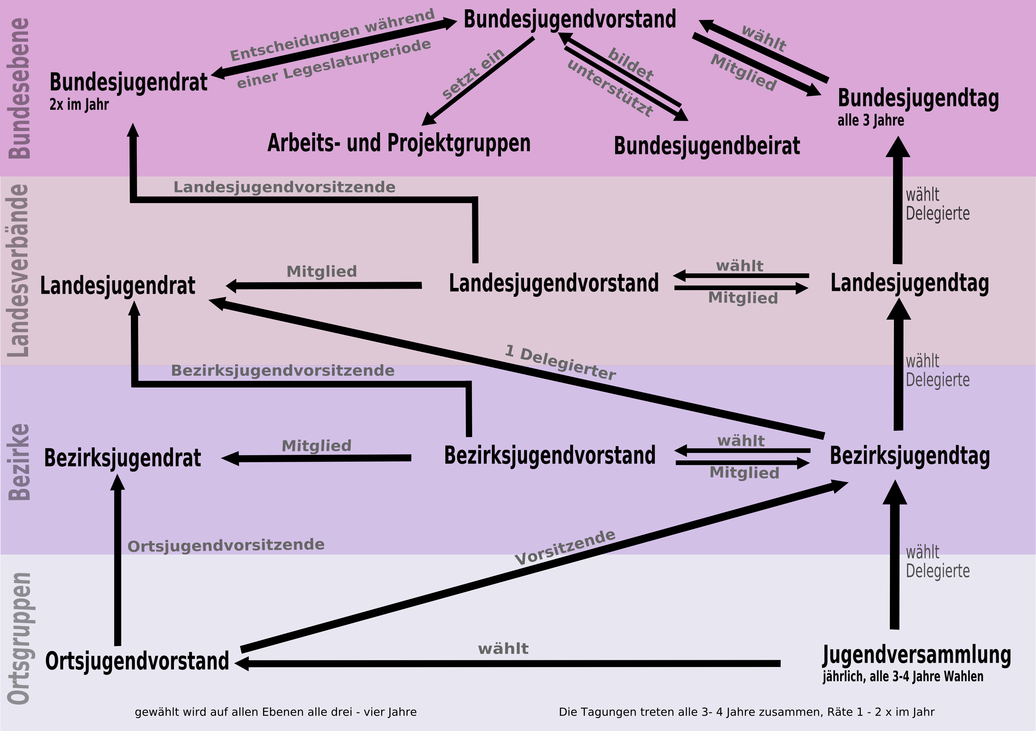 organisatorischer Aufbau der DLRG-Jugend